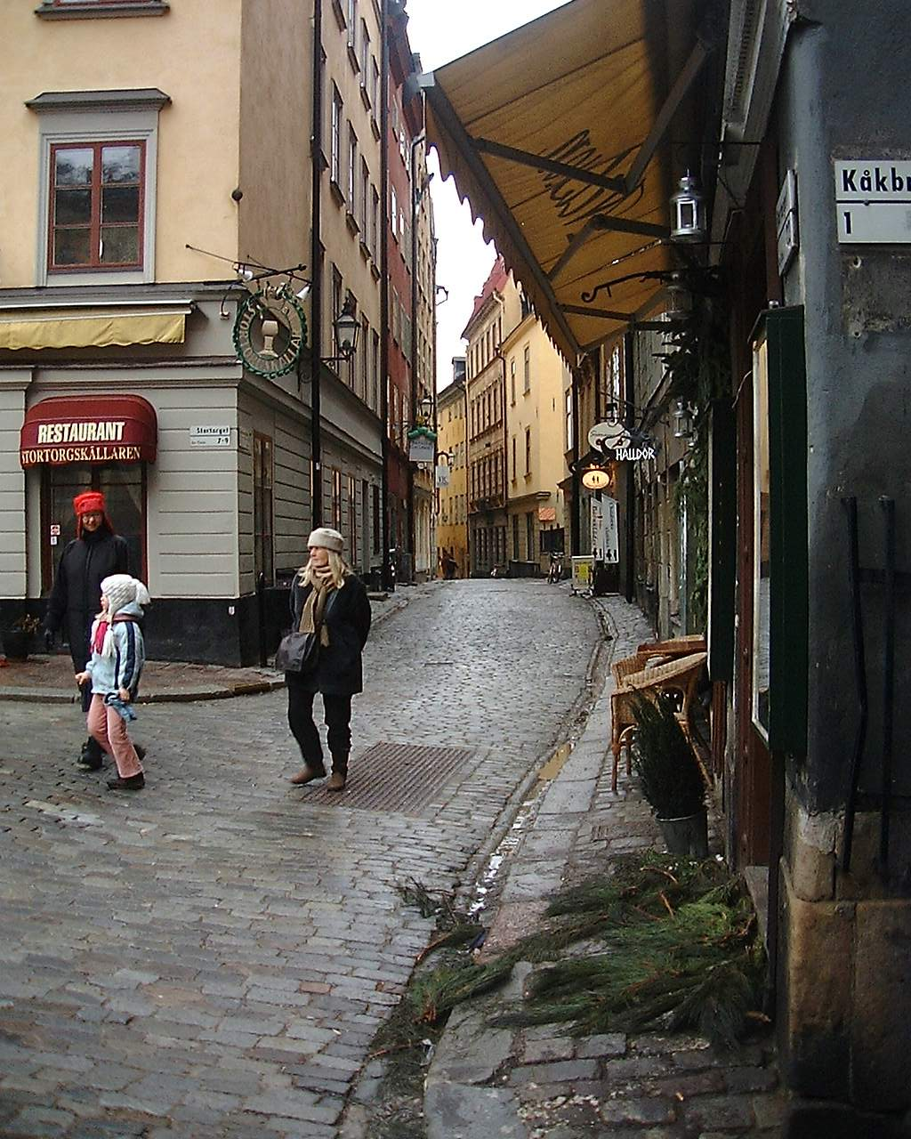 Skomakargatan, Gamla stan, Stockholm